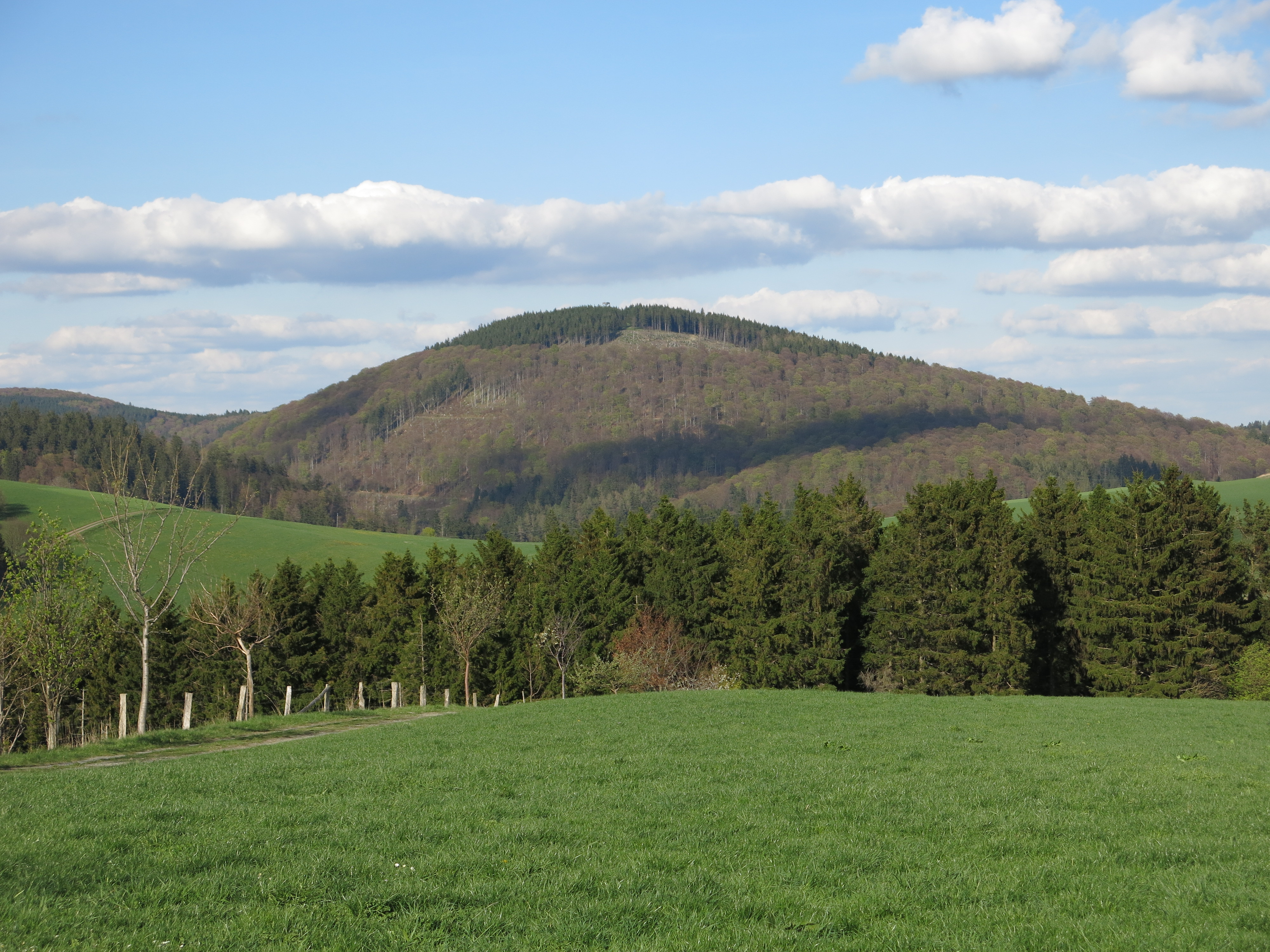 Der Berg Dommel (738 m) im hessischen Upland (Rothaargebirge) von Südwesten